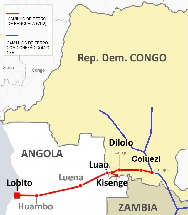 Mapa do Caminho de Ferro de Benguela, com conexão com os caminhos de ferro do Congo-Quinxassa e da Zâmbia.